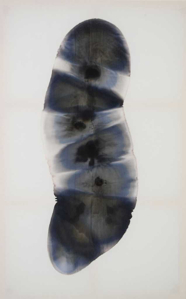 Stephanie Lüning,You, 2017 verschiedene Materialien auf Stoff 210 x130 cm